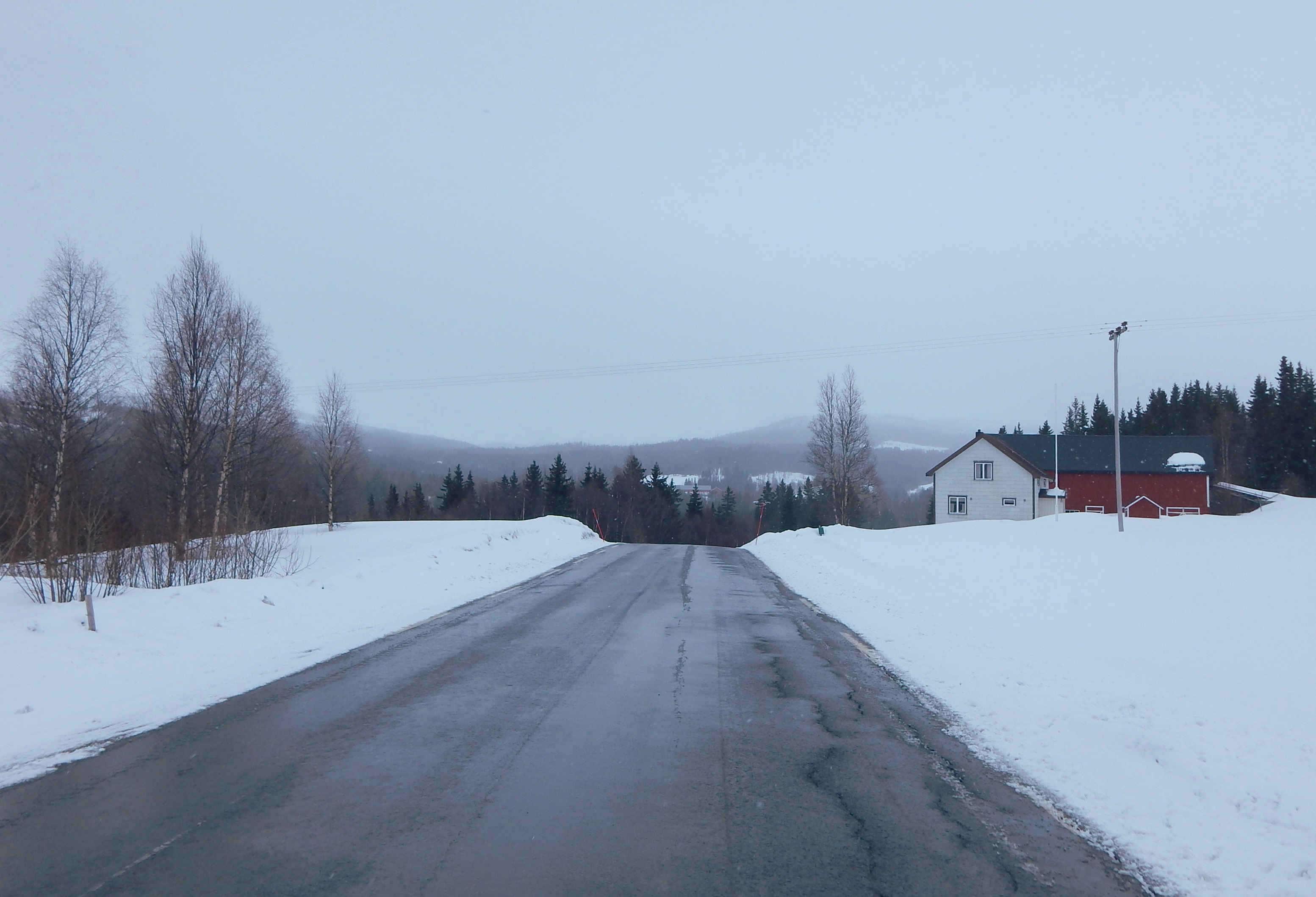 Reitvegen (fylkesvei 6540 (tidligere Fv572))